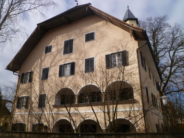 Doktor Schlössl-Eingang